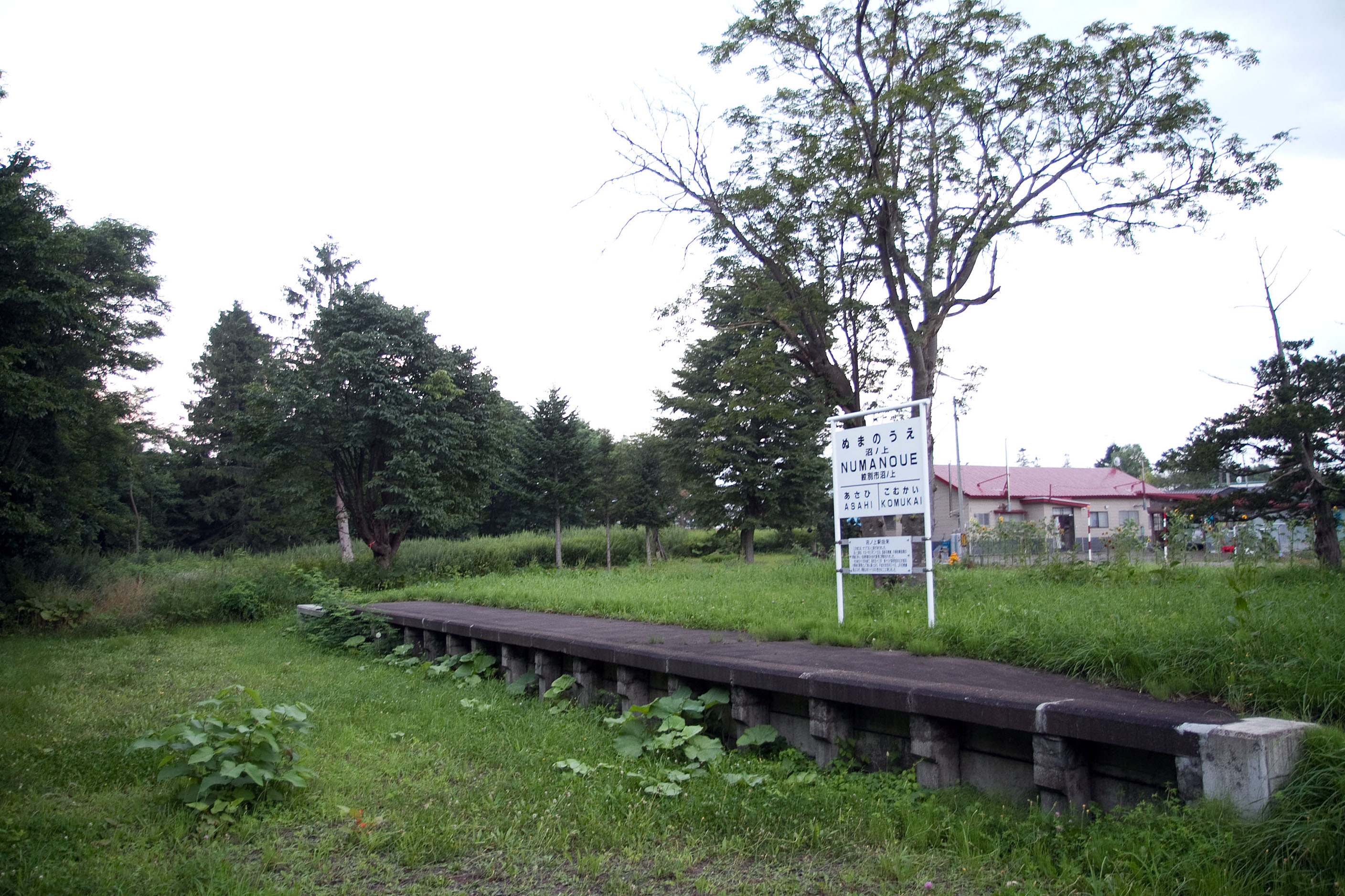 周囲は記念公園として整備されている